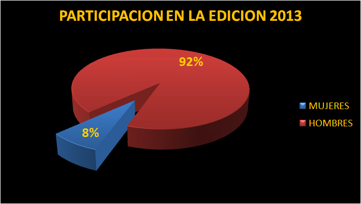 Estadisticas de la prueba